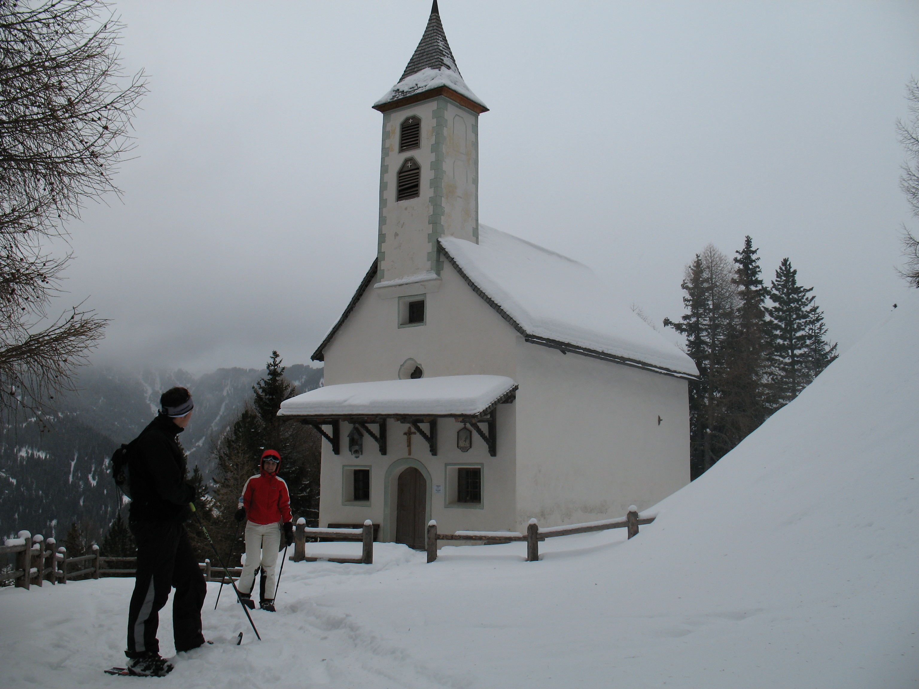 St. Martin im Zerzertal (Südtirol)